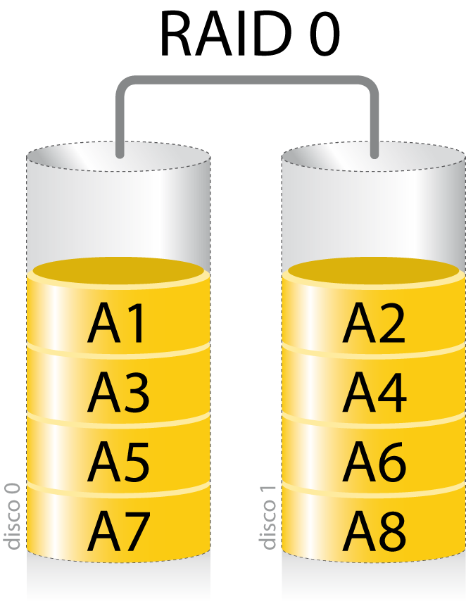 Esquema del sistema RAID 0